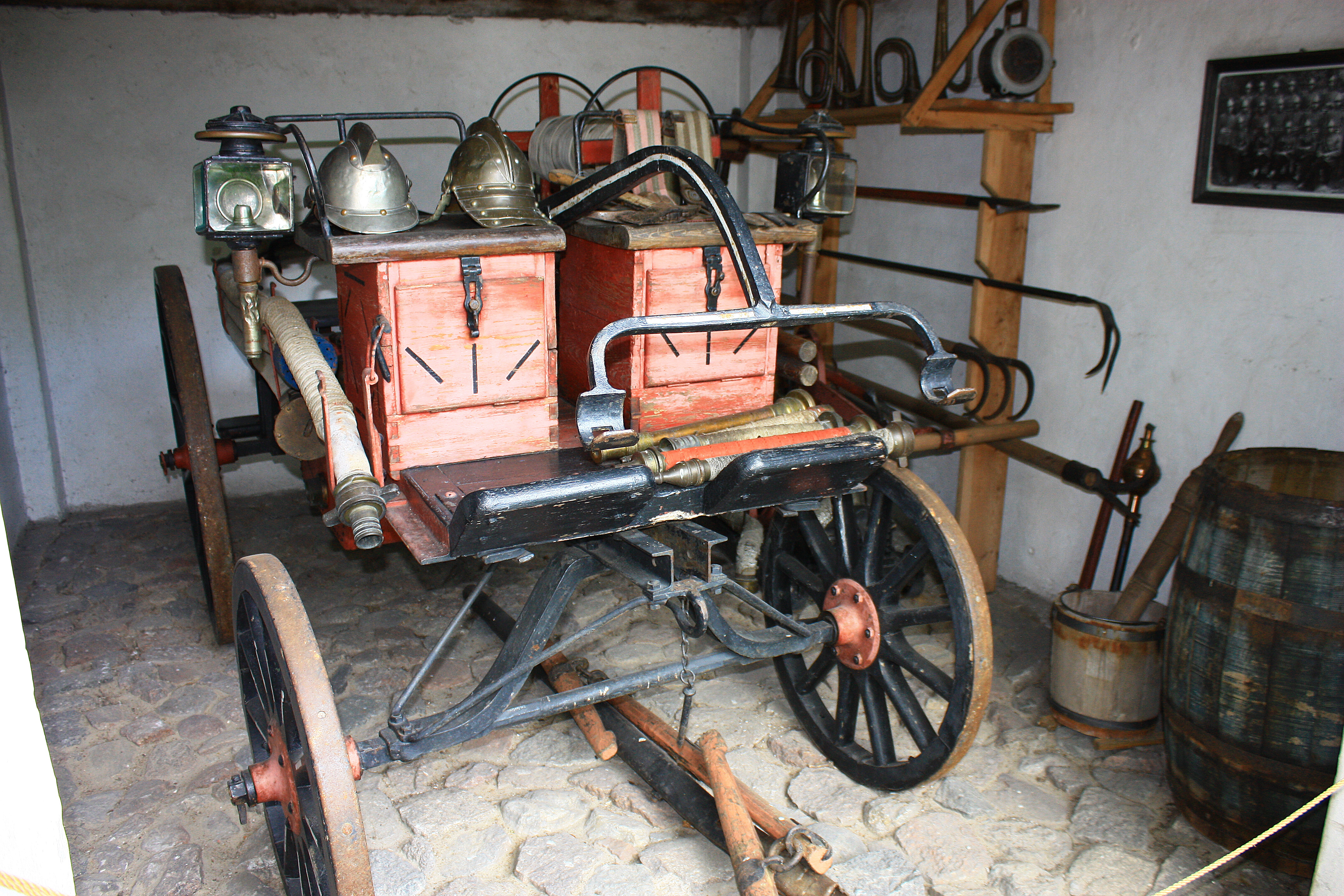 Toruń - Park Etnograficzny - Remiza Ochotniczej Straży Pożarnej, pocz. XX w., Pływaczewo, ziemia chełmińska